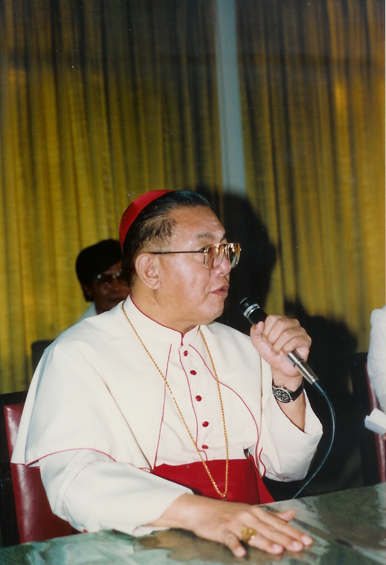 Sujet:Kardinal Jaime Sin (1988)